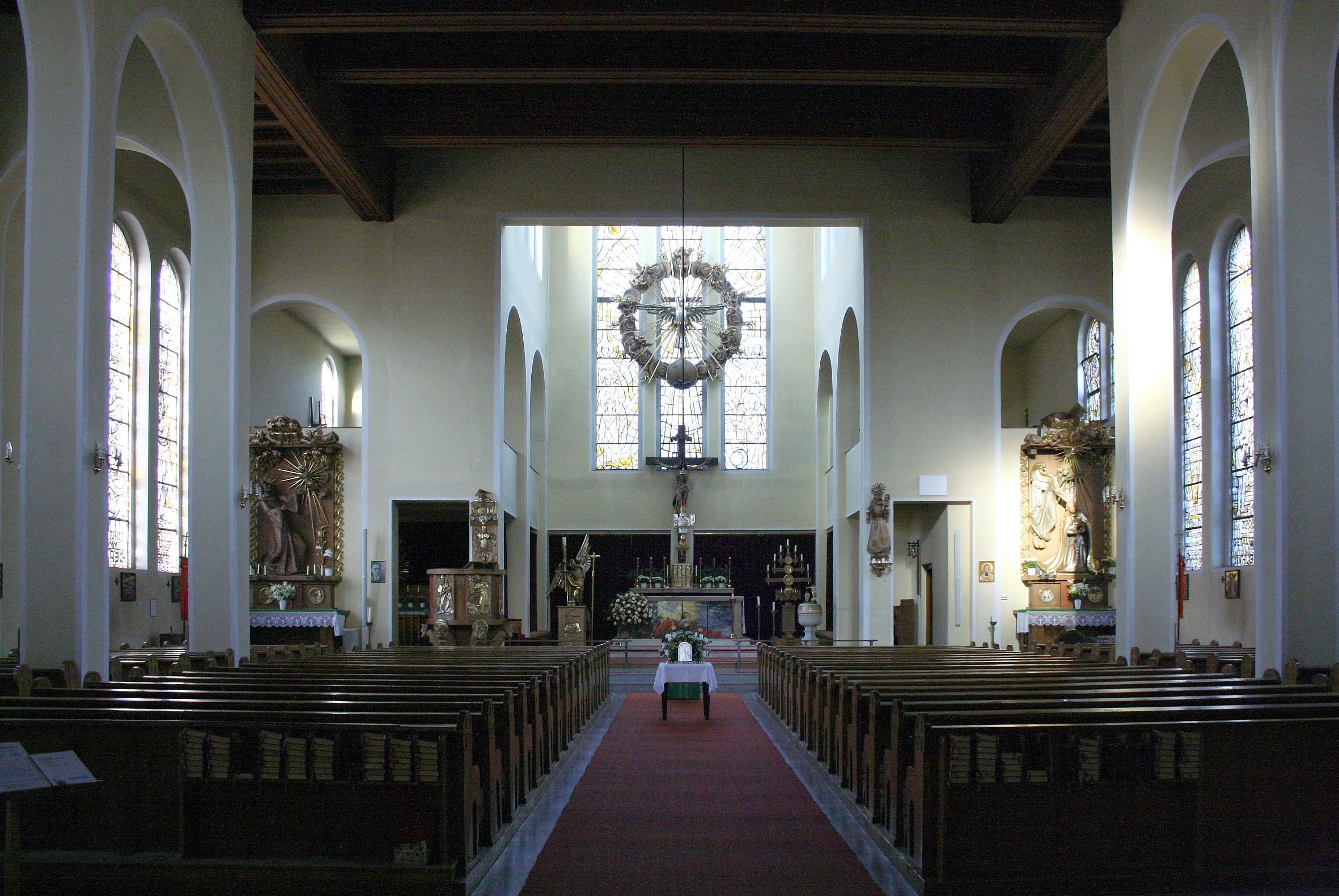 Innenansicht Richtung Altar der Pfarrkirche Hl. Geist in der oberösterreichischen Stadt Attnang-Puchheim.